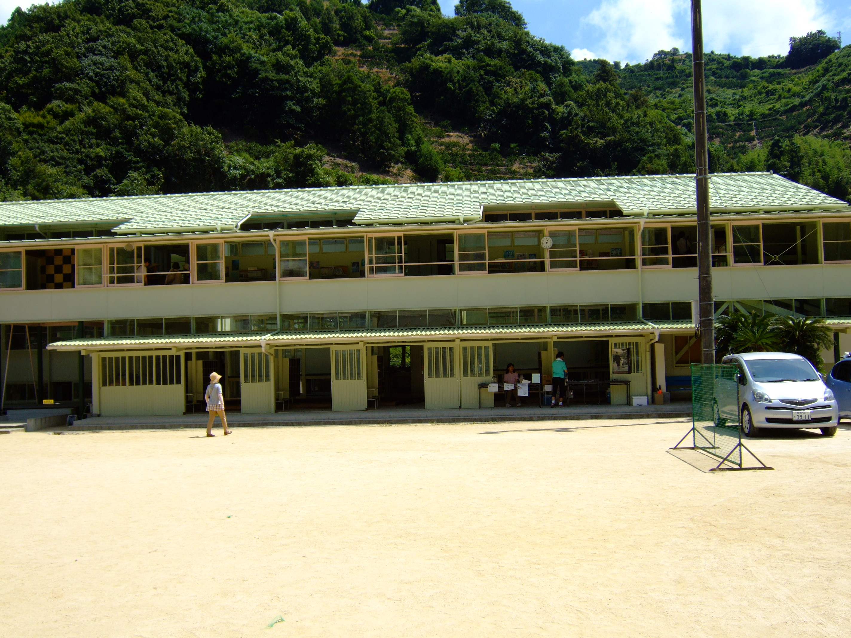 八幡浜市立日土小学校東校舎